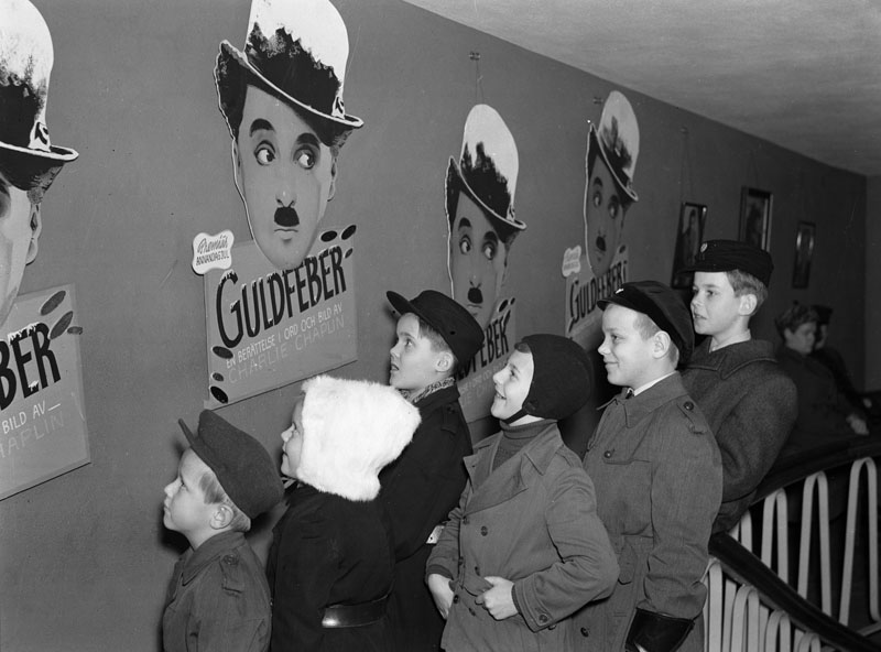 Charlie Chaplinfilmen "Guldfeber" på biografen Park i Stockholm